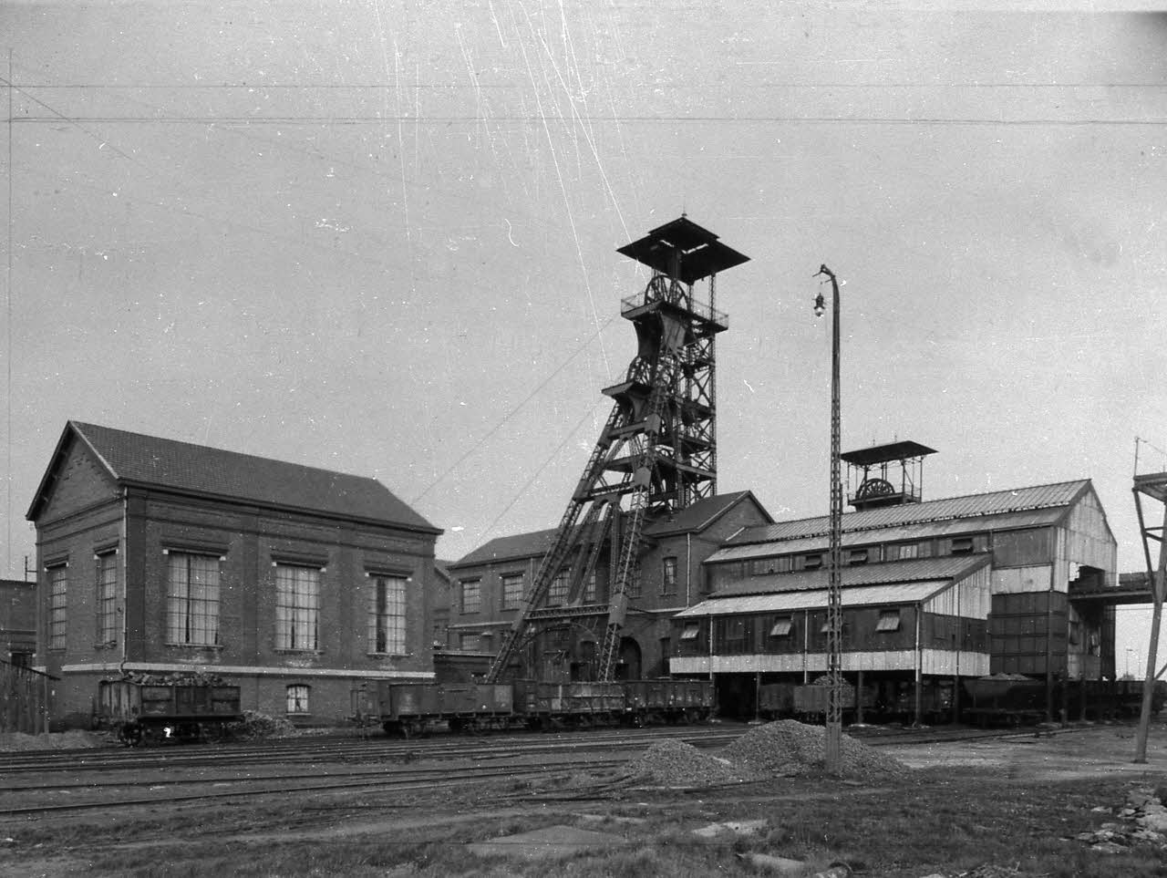 La fosse Cuvinot de la Compagnie des mines d'Anzin était un charbonnage constitué de deux puits situé à Onnaing, Nord, Nord-Pas-de-Calais, France.